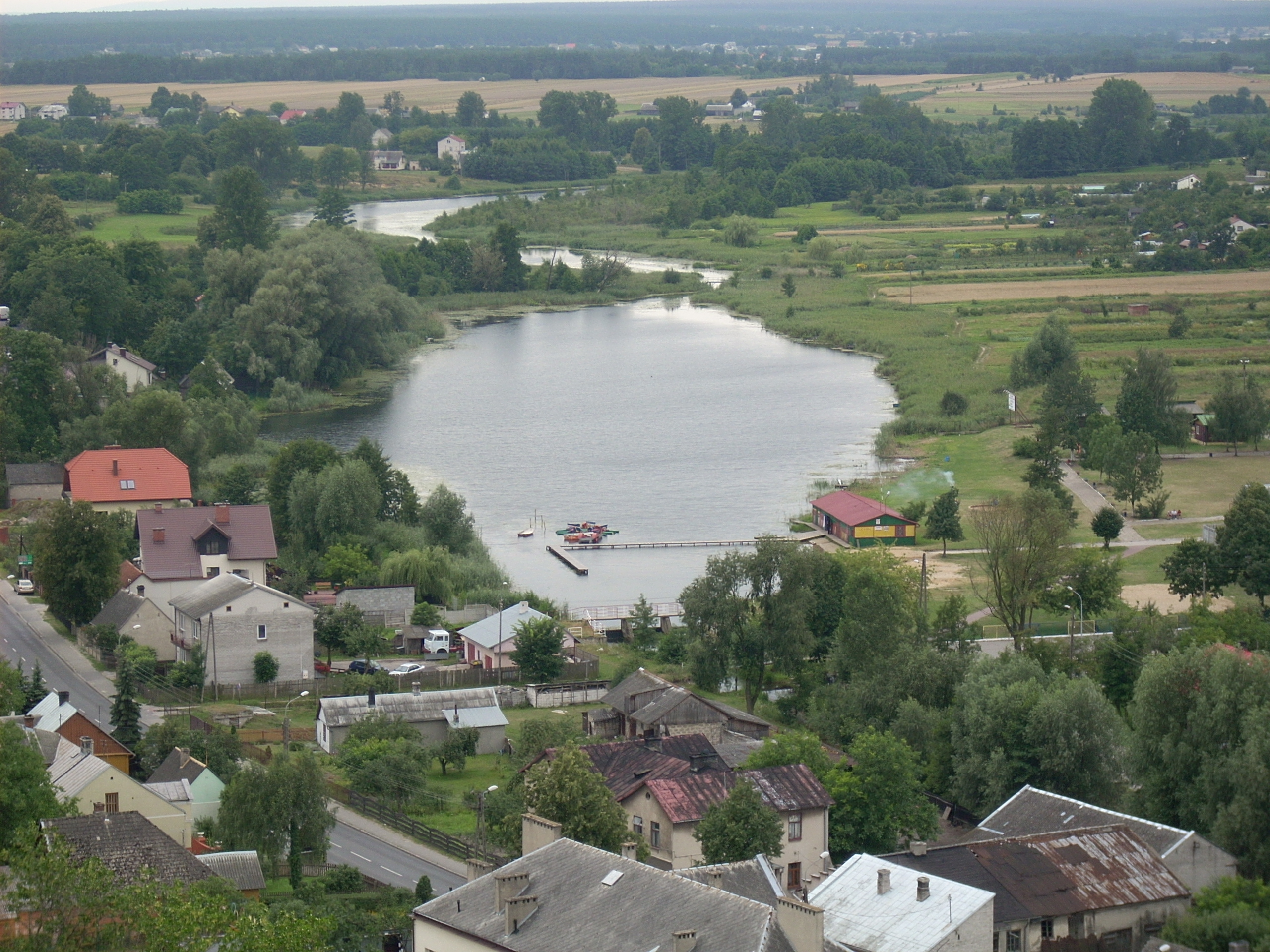 Iłża - widok z baszty na zalew